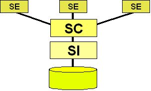 Modèle d'architecture de fédération fortement couplée